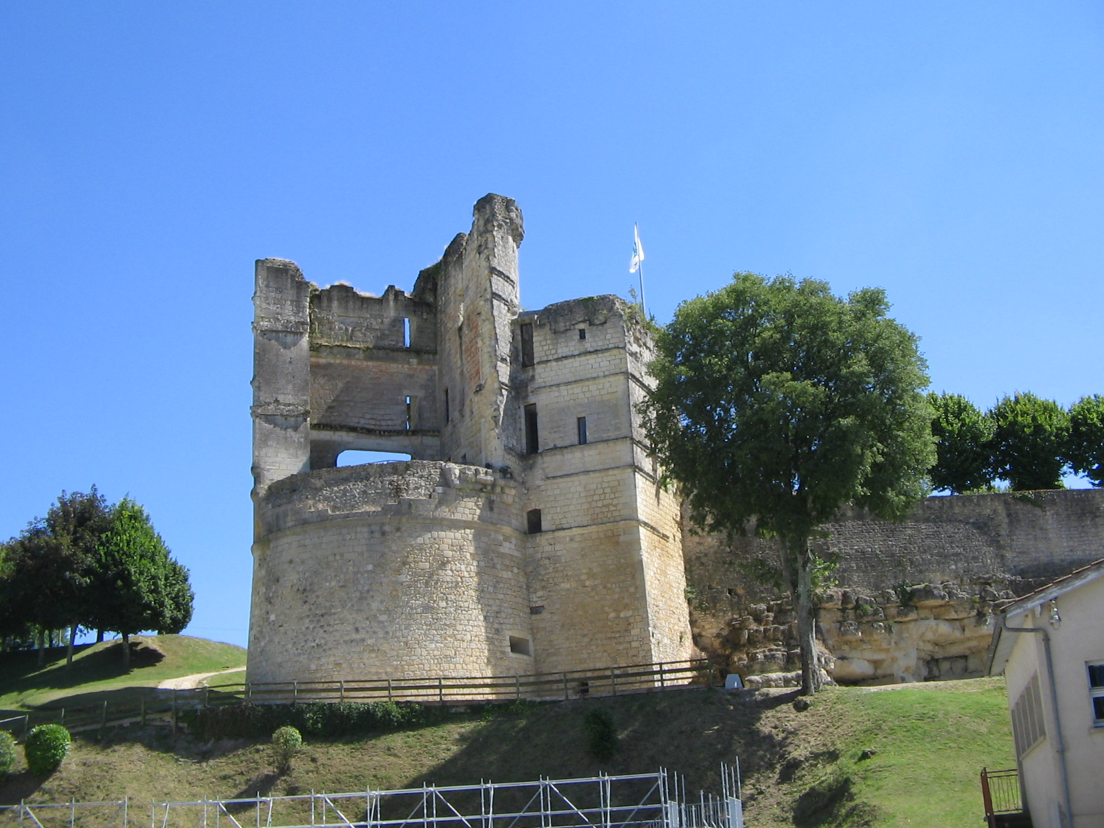 Le château de Montguyon, été 2008